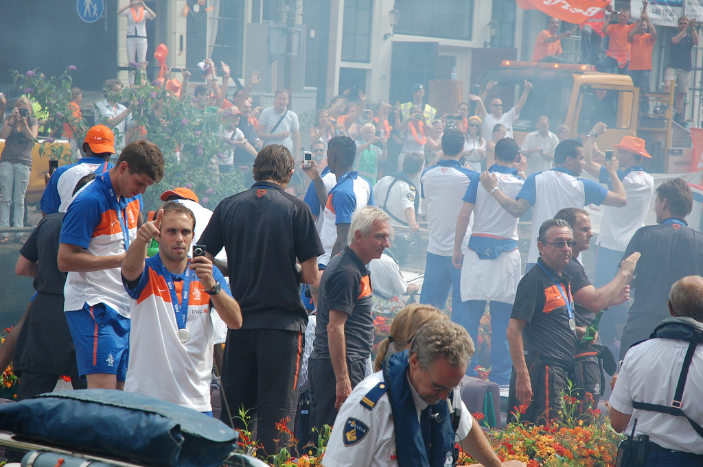 Klaas-Jan Huntelaar & Joris Mathijsen